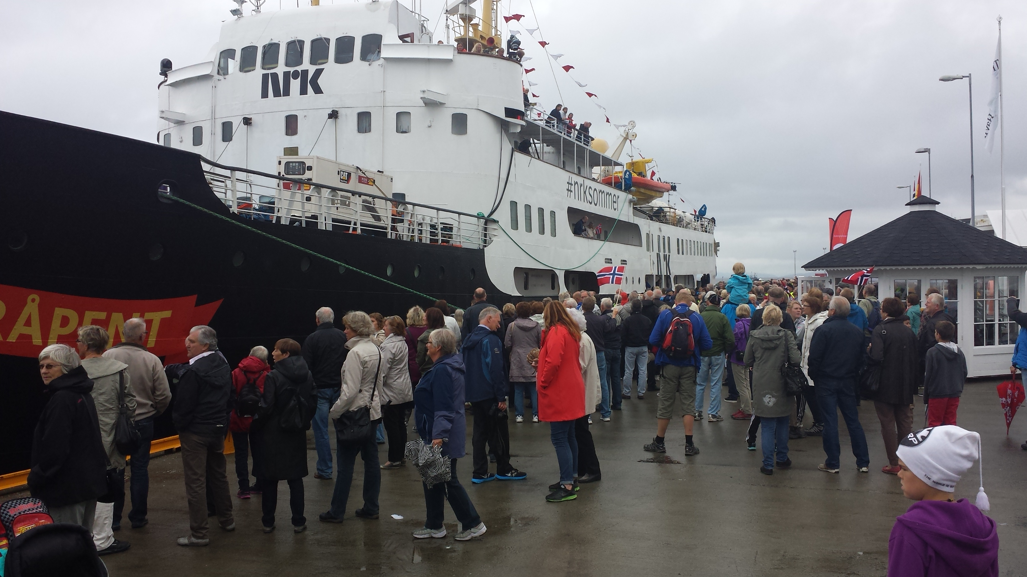 Godt oppmøte på kaia